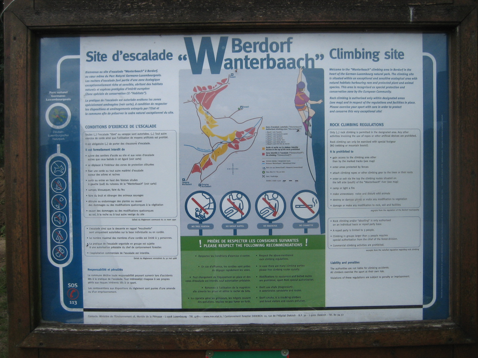 Sujet: Panneau, deen explizéiert, wou a wéi een an der Wanterbaach zu Bäerdref Alpinismus maachen däerf. Auteur: Zinneke Lizenz: GNU-FDL